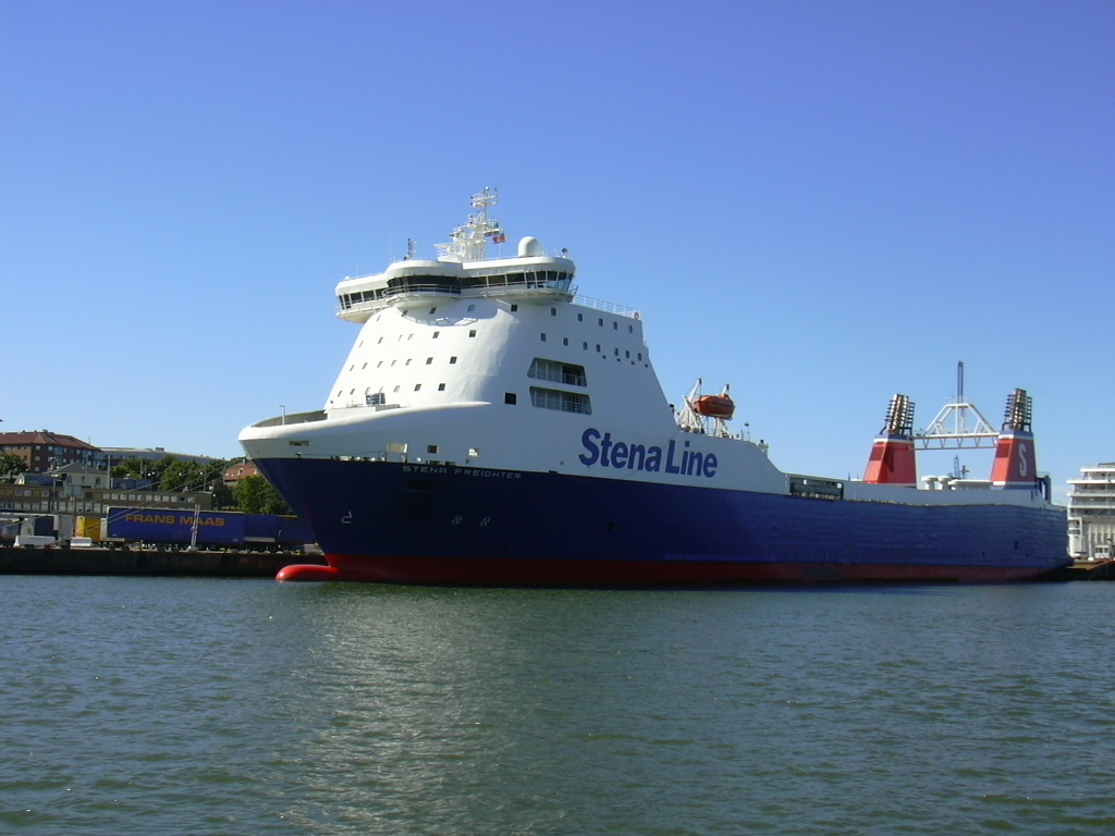 Stena Freighter Vid Majnabbeterminalen